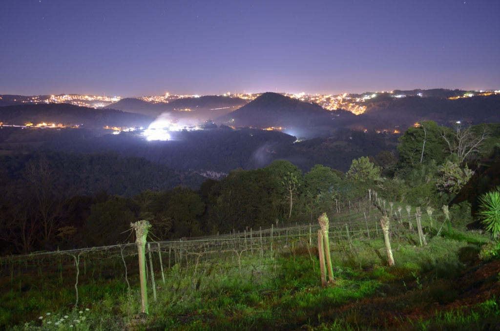 Pinto Bandeira - RS, Brazil